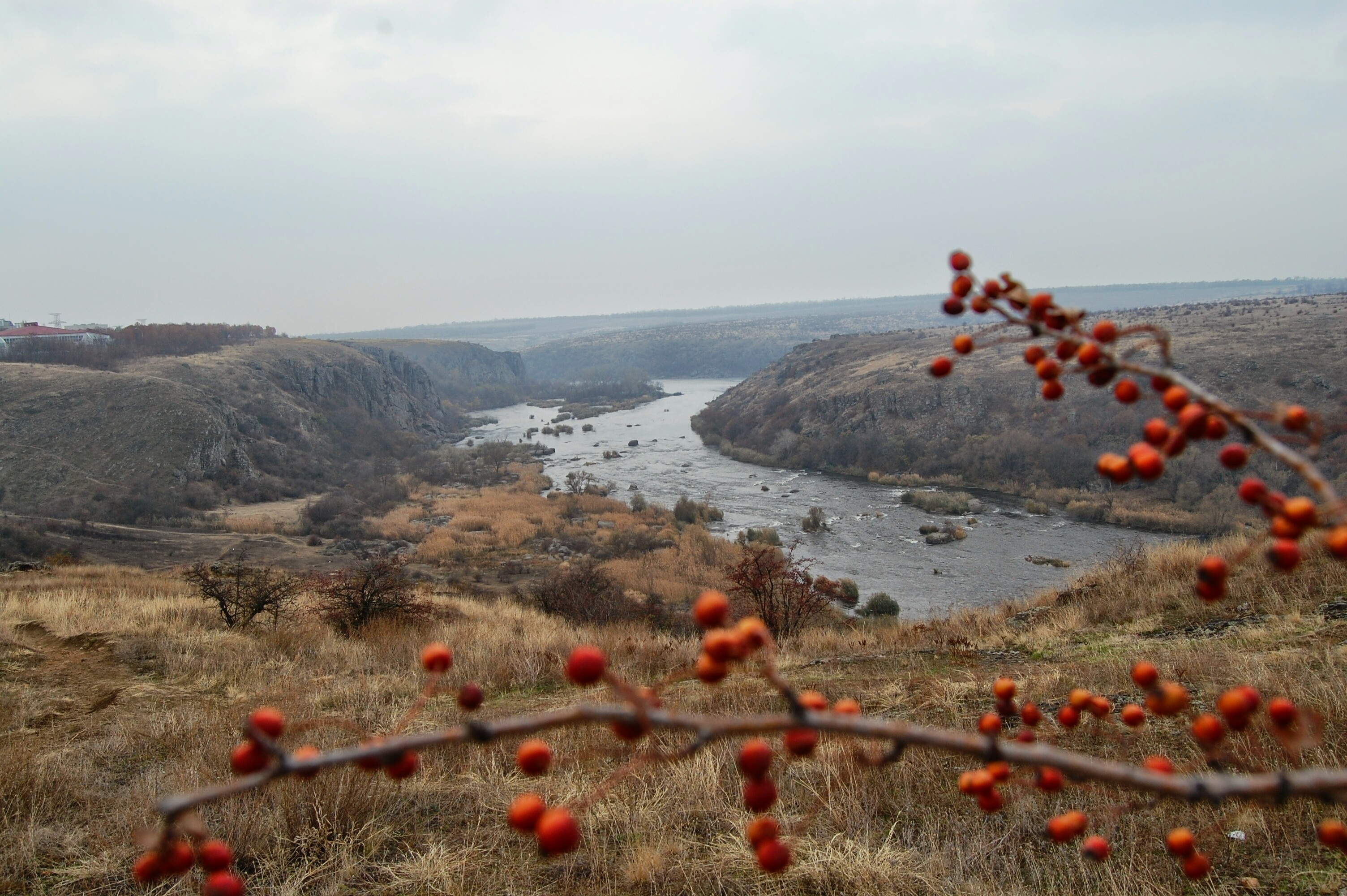 Історичний ландшафт центру Буго-Гардівської паланки Війська Запорозького, смт Костянтинівка Арбузинського району,село Богданівка Доманівського району,місто Южноукраїнськ